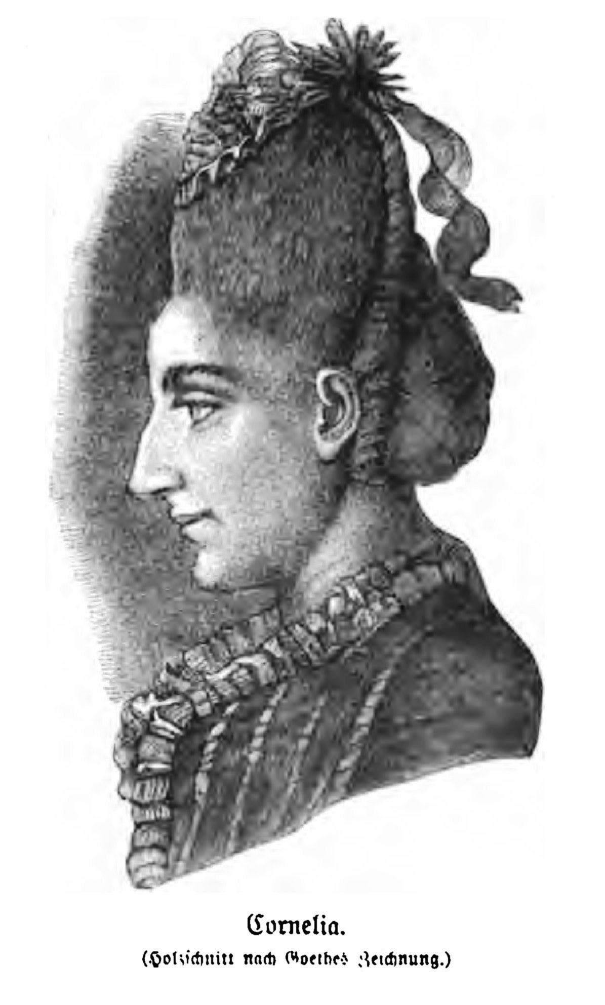 Cornelia Schlosser. Holzschnitt nach einer Zeichnung von Johann Wolfgang von Goethe. Aus: Goethes Mutter: Ein Lebensbild nach den Quellen von Dr. Karl Heinemann. 5. Auflage. Leipzig: Seemann. S. 46